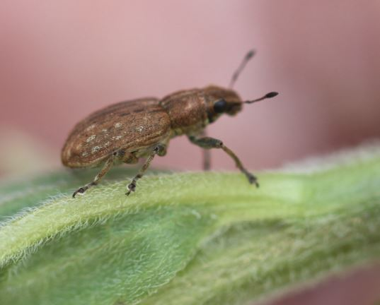 Sitona puncticollis am 8. Juni 2018 in der Schwetzinger Hardt